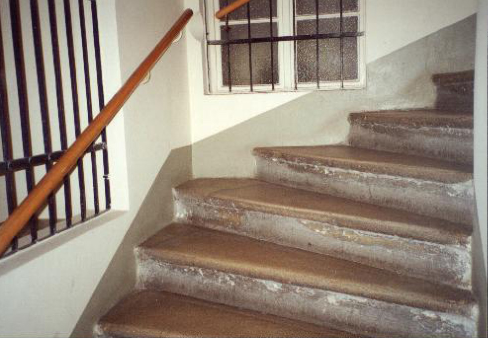 Haus mit Renaissanceportal, Sonnenfelsgasse 15, Stiegenstufen Kaiserstein